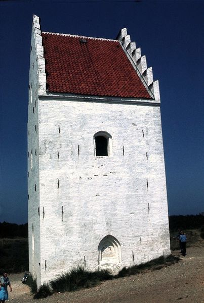 Skagen Kirke i Danmark. Den tilsandede kirke